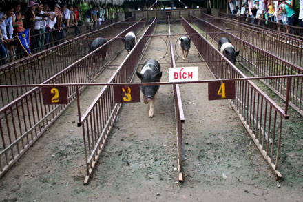 đua heo ở mỹ khánh